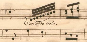 La marque con dedo solo de la sonate K. 379, telle qu'elle se présente dans le manuscrit de Parme, volume X no. 22. Scarlatti invente le glissando, utilisé ensuite au XIXe siècle.